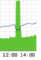 DDoS 65 Гбит/c